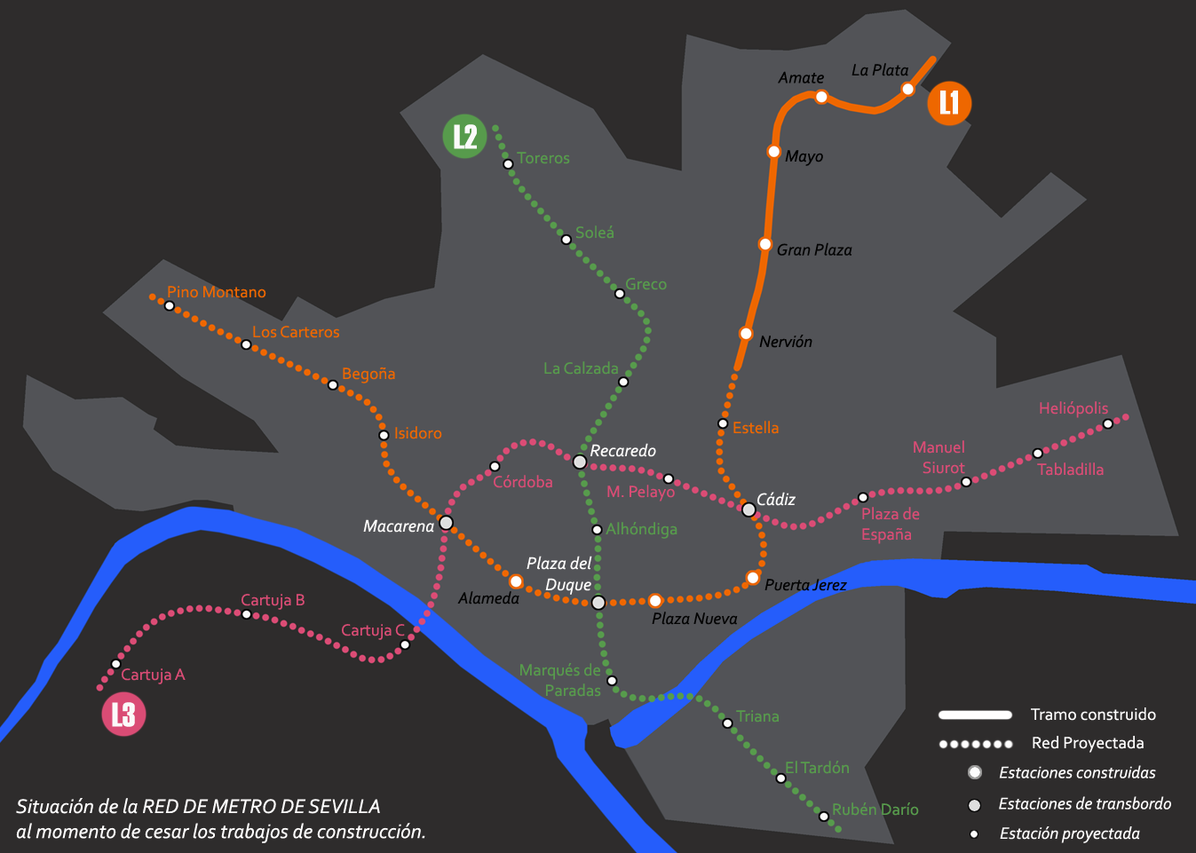 Ancient Metro Map